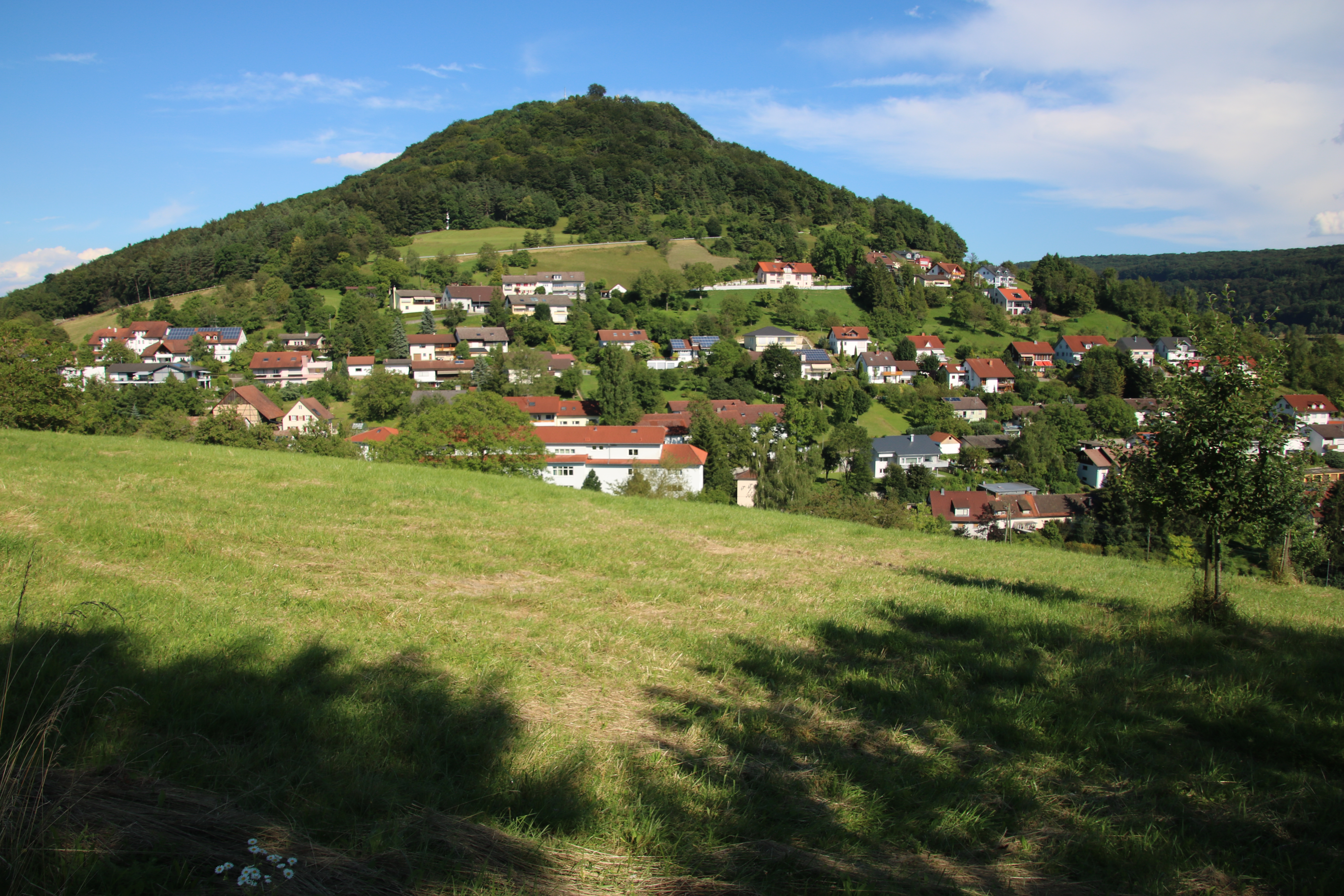 Bechtersbohl, Ortsteil der Gemeinde Küssaberg im Landkreis Waldshut in Baden-Württemberg. Blick auf den Neubau-Bereich am Küssenberg.